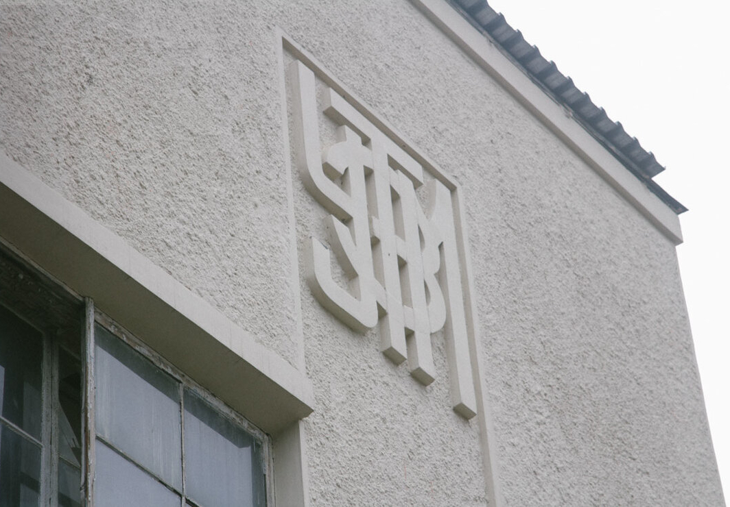 Знак УЗТМ на здании